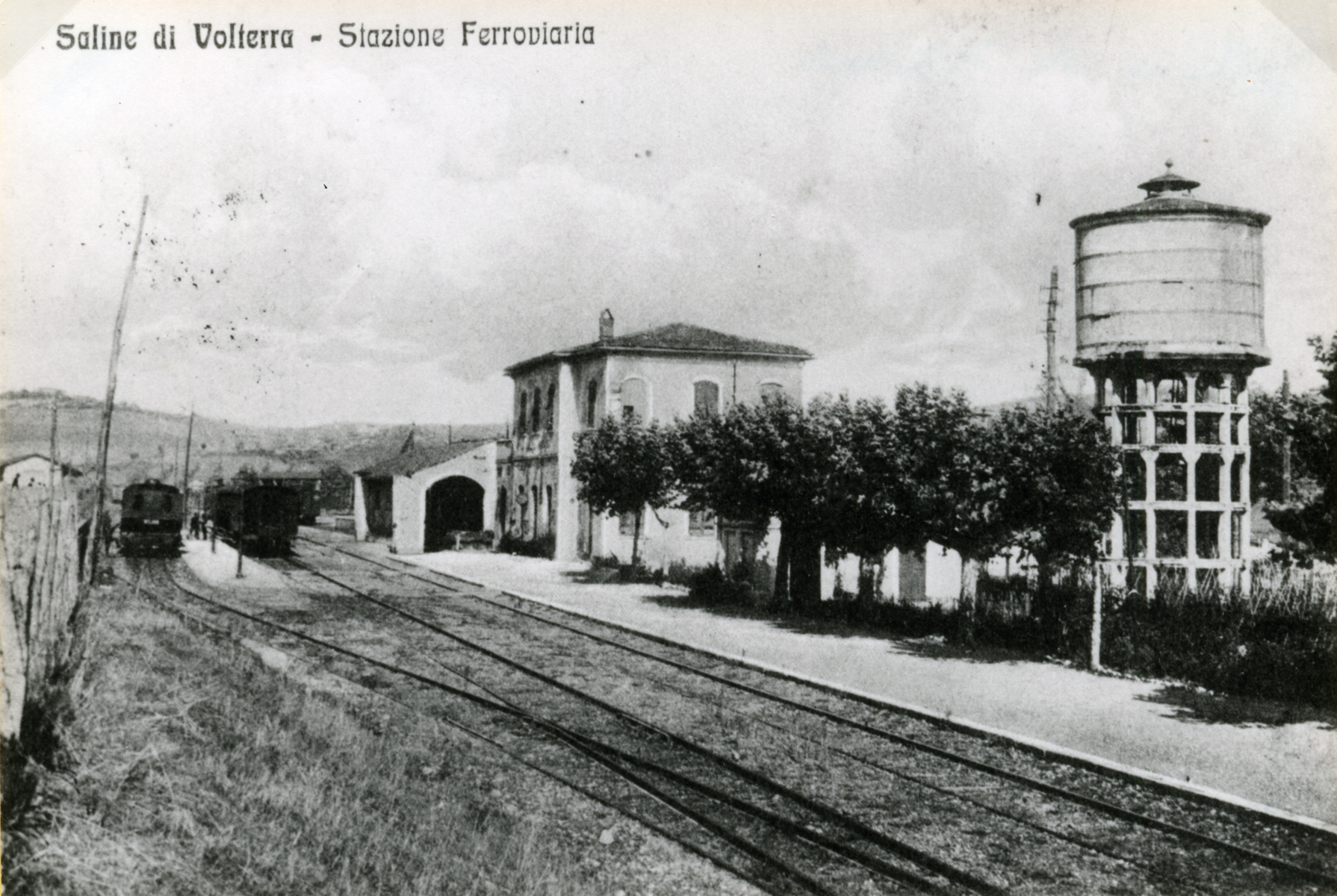 La stazione di Saline di Volterra dopo la costruzione del tratto a cremagliera Saline-Volterra. Il convoglio sulla sinistra (è sul 3° binario) è appunto quello per Volterra